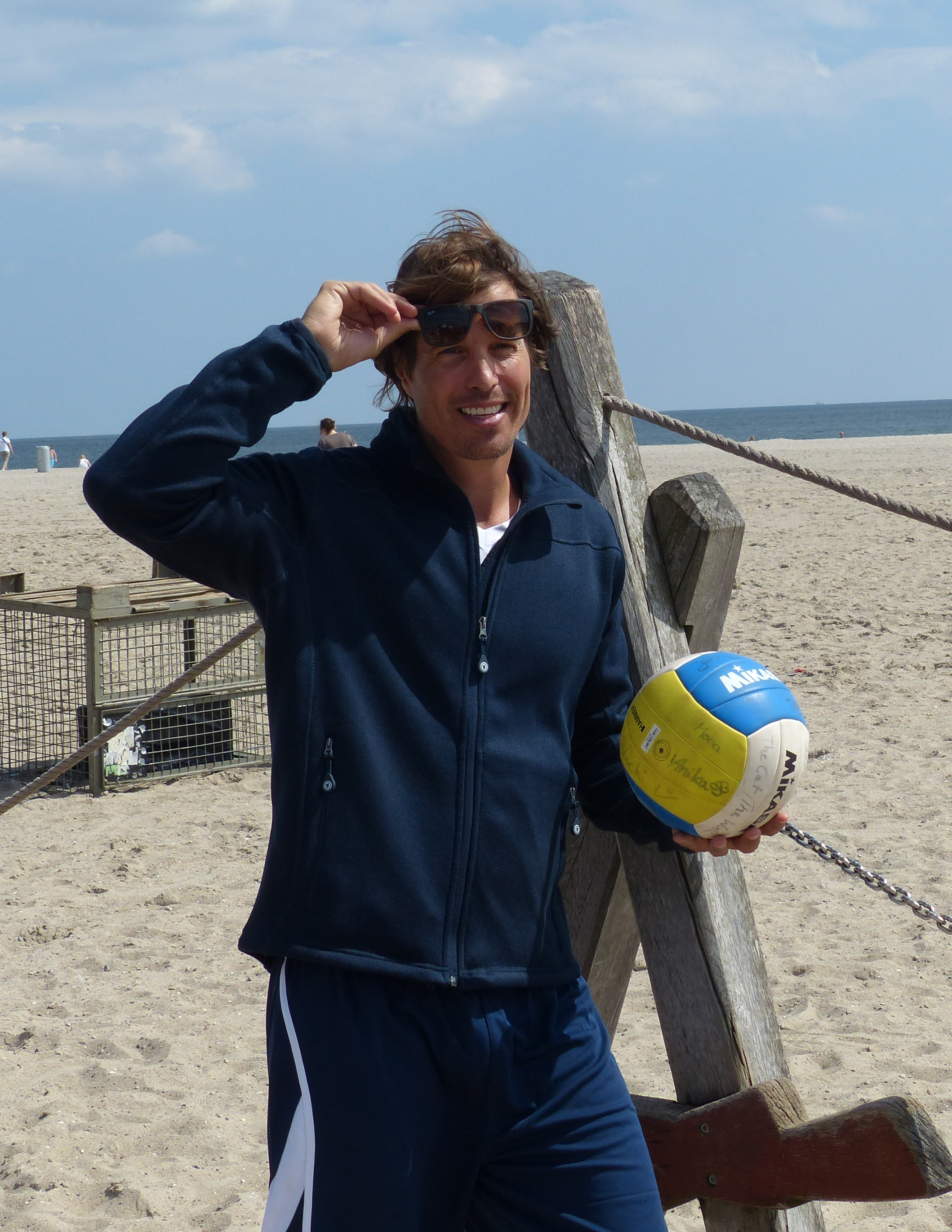 Fotoshooting mit Hakim-Michael Meziani zum Beachvolleyball-Starcup 2013